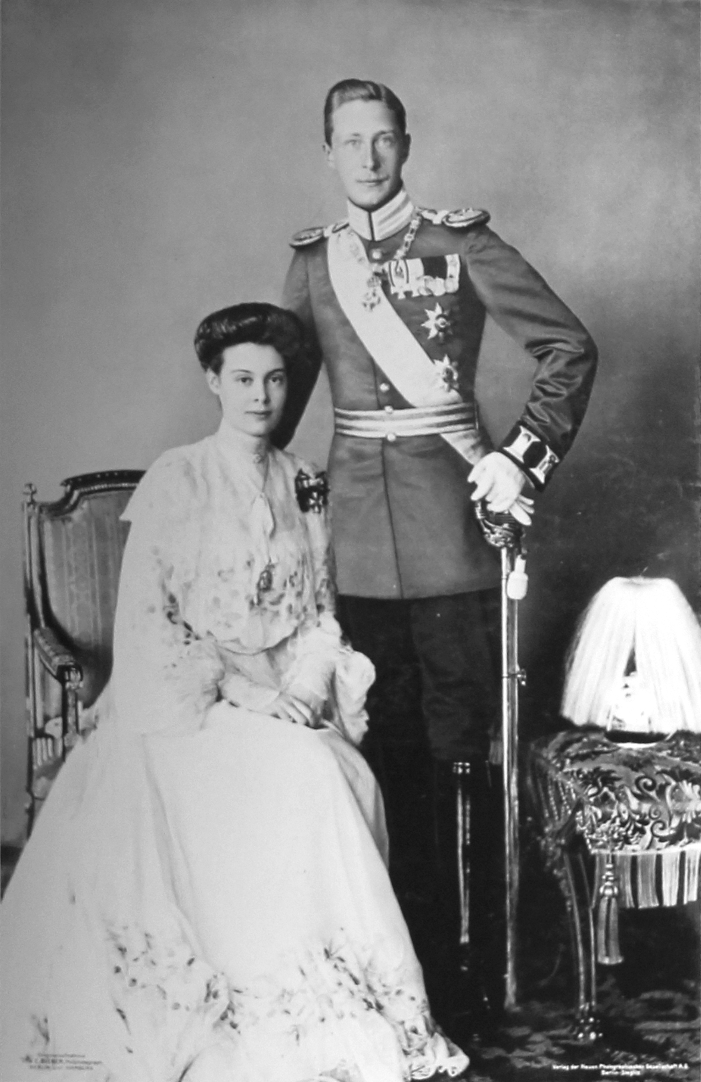 Verlobung von Kronprinz Wilhelm mit Prinzessin Cecilie.